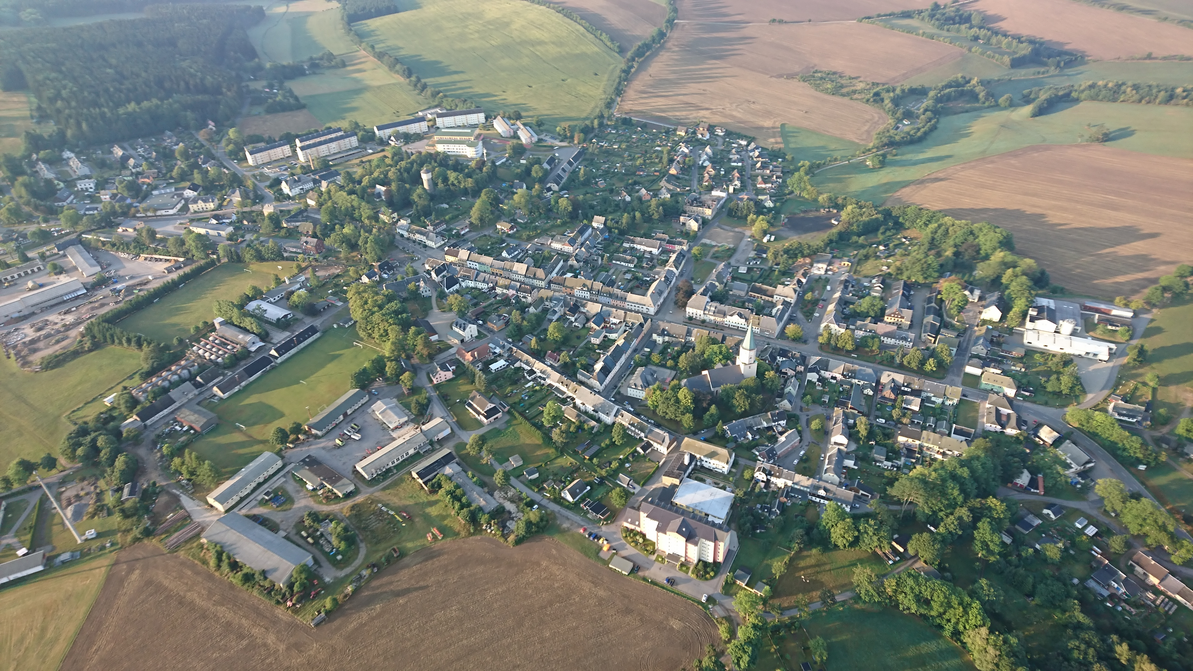 Luftbild Sayda